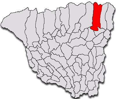 Categorie:Hărţi ale judeţului Gorj